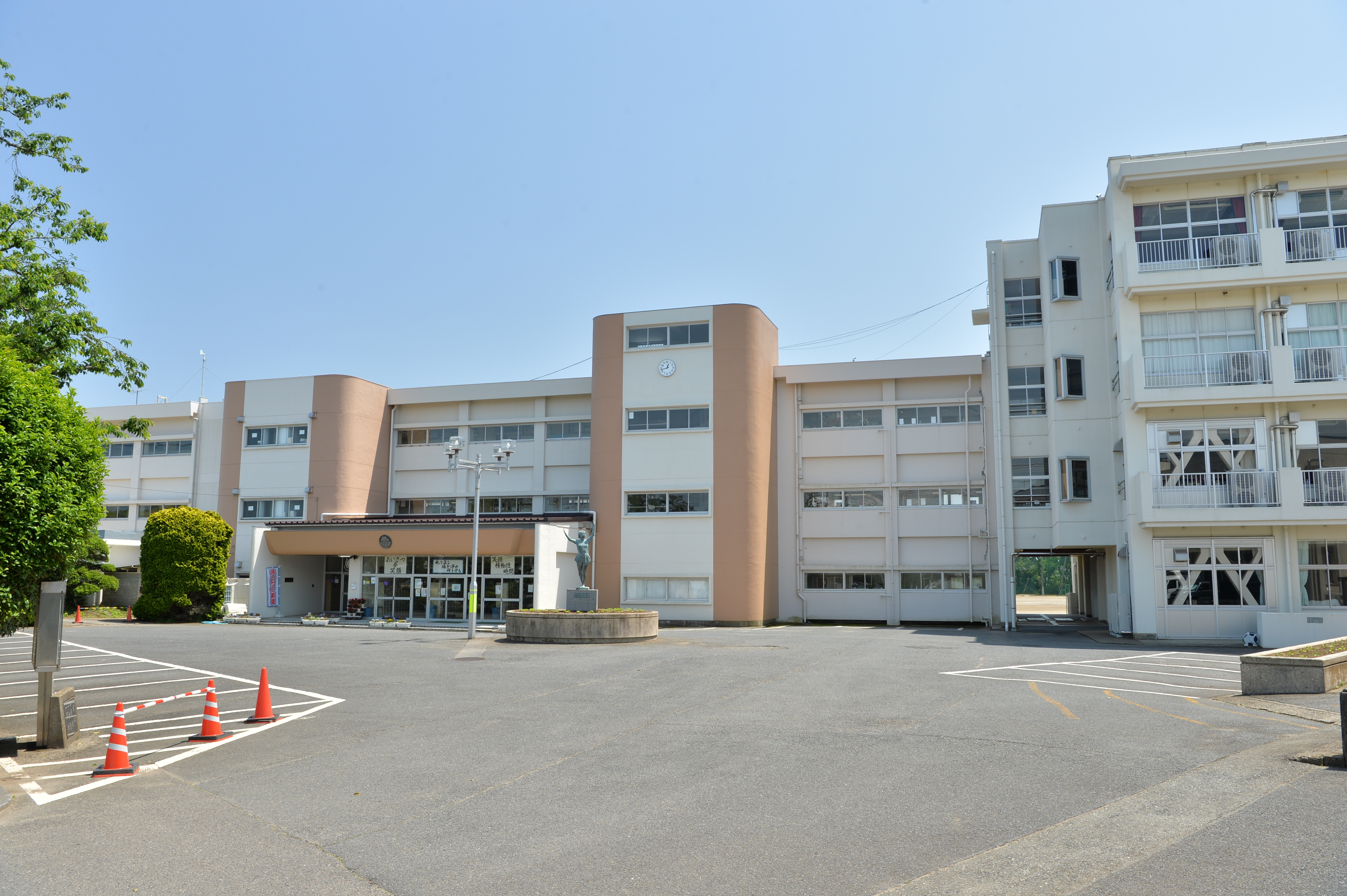 ひたちなか市馬渡に所在する、ひたちなか市立勝田第三中学校の校舎（昇降口側）